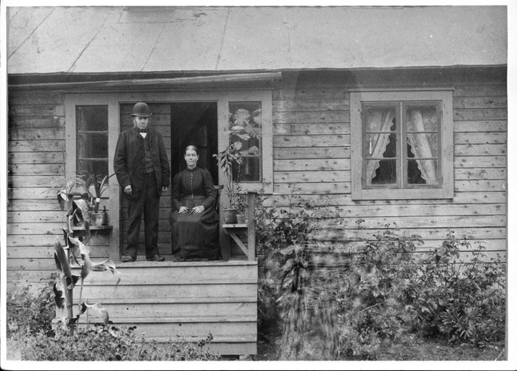 Torpet Henriksdal, som låg under Sandviks gård, Järfälla, Stockholms län. Torparparet Gustaf Andersson och hans hustru Helena Catharina, född Johannesdotter (kallad Mor Lena). Torpet upptages i husförhörsboken från 1866 och bebos då av torparen Gustaf Andersson, som är kvar på torpet ända till 1904.